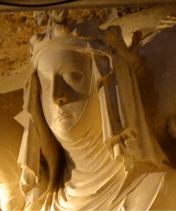 Monestir de Santes Creus (Aiguamúrcia)